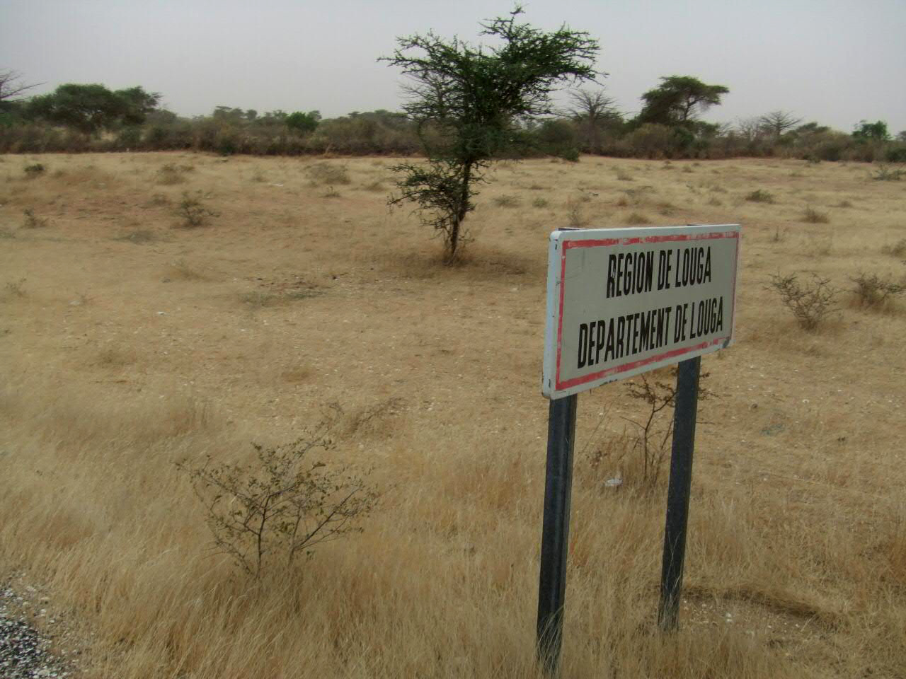 Entrée du département de Louga (Sénégal). Paysage typique de la région